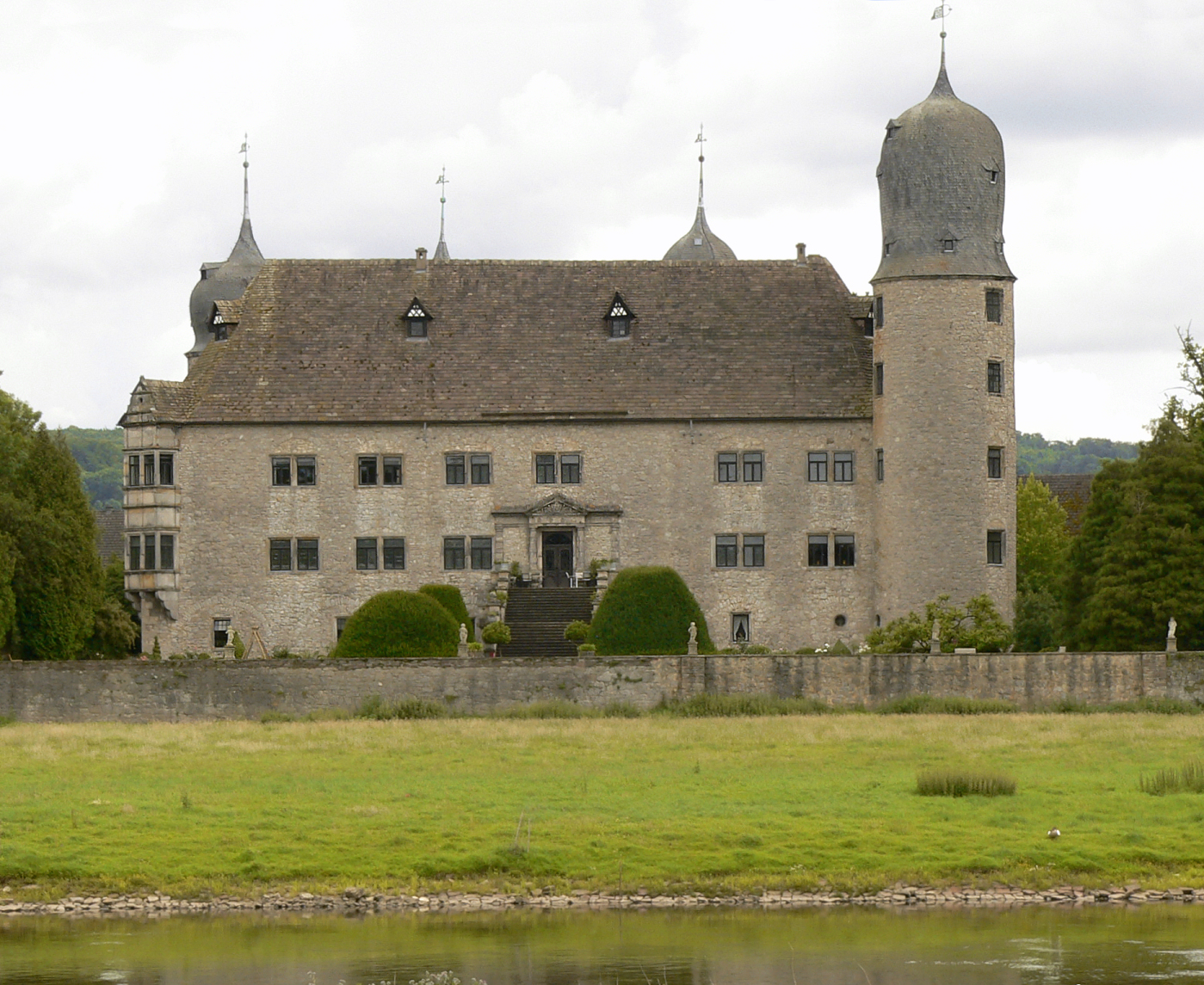 Wasserschloss Hehlen Weserseite